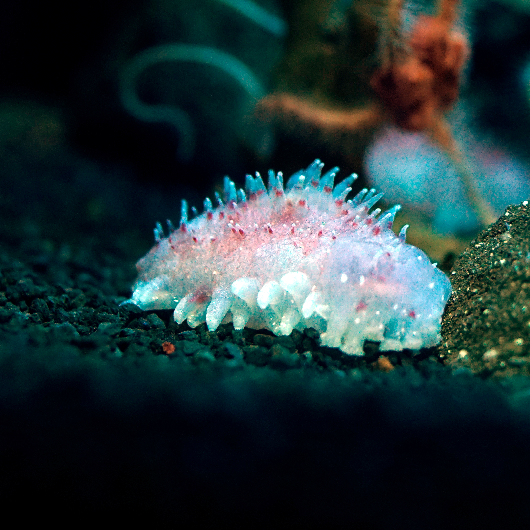 ヒメカンテンナマコ Deepsea agar seacucumber Domain: Eukaryota • Regnum: Animalia • Phylum: Echinodermata • Subphylum: Echinozoa • Classis: Holothuroidea • Ordo: Elasipodida • Familia: Laetomogonidae • Genus: Laetmogone Wikispecies has an entry on: Laetmogone maculata. Species Laetmogone maculata (Theel, 1879) 動物界 棘皮動物門 ナマコ網 カンテンナマコ目 カンテンナマコ科 Laetmogone属 Location: Numazu Deepblue Aquarium, Japan Other photos: uBio search link: Laetmogone maculata